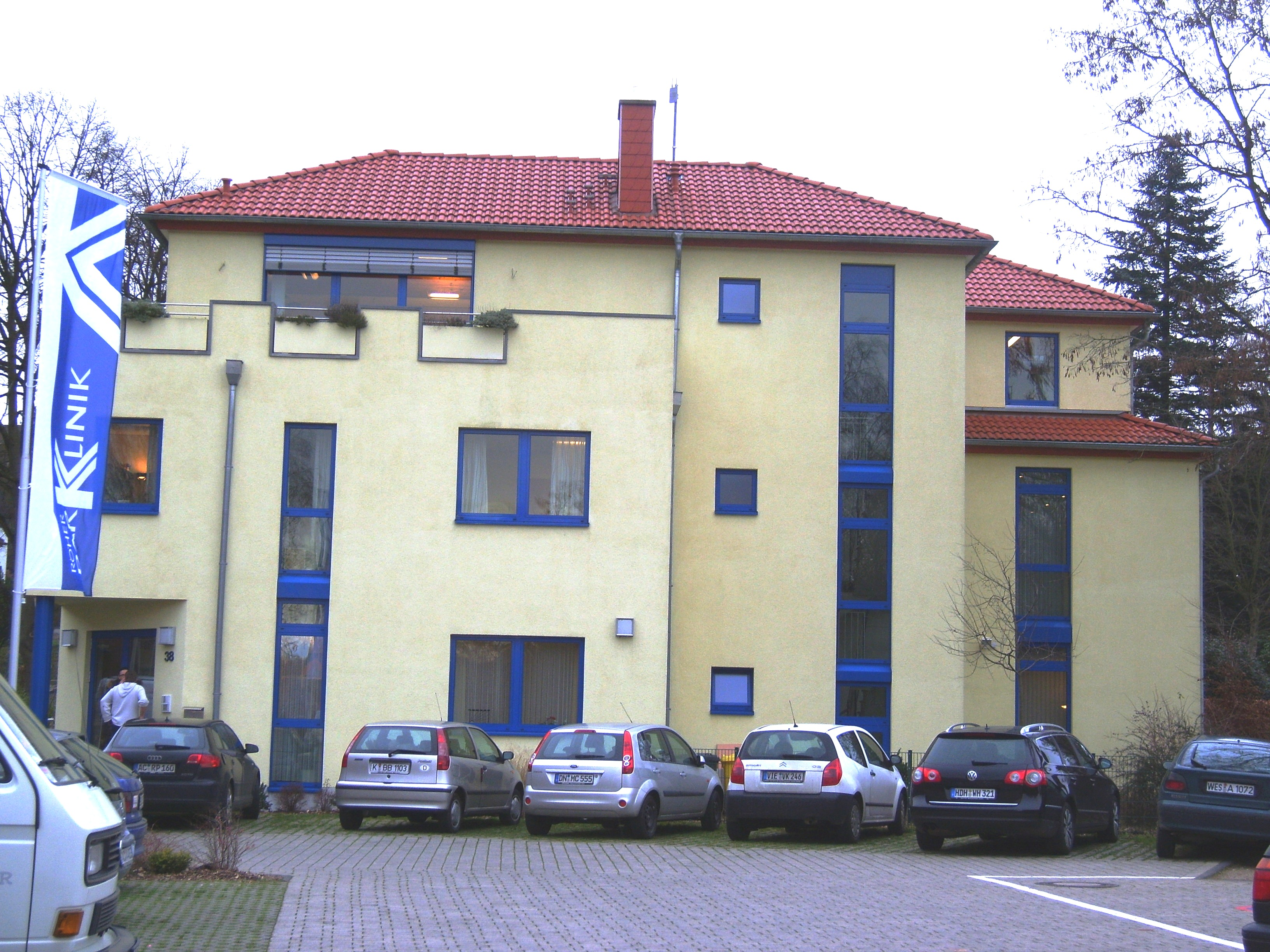 Parkklinik Röhe im Eschweiler Stadtteil Röhe